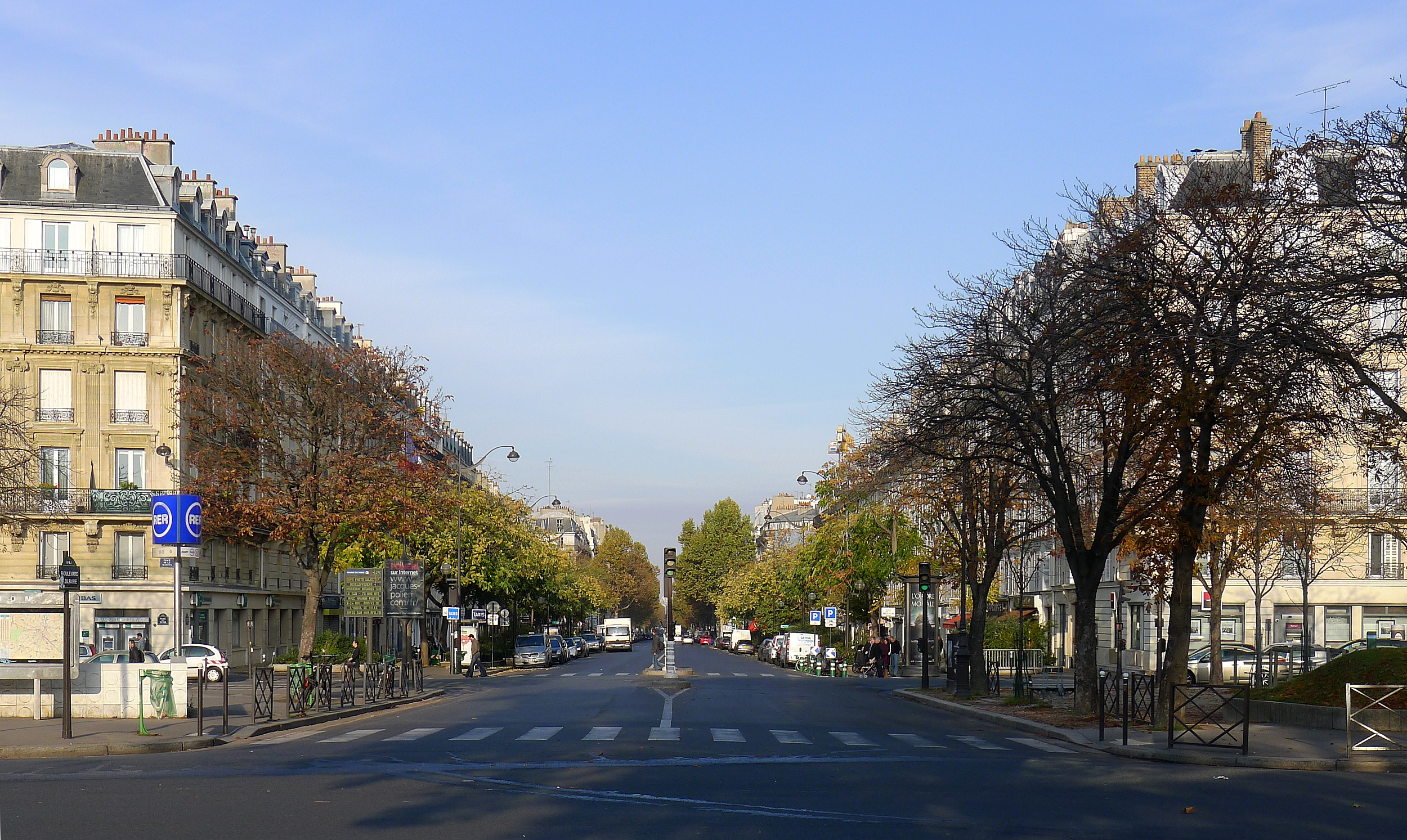 Boulevard Voltaire au niveau de la place de la Nation - Paris XI